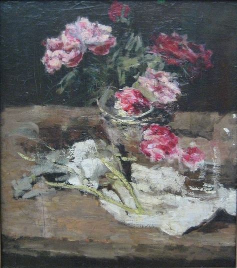 Still Life